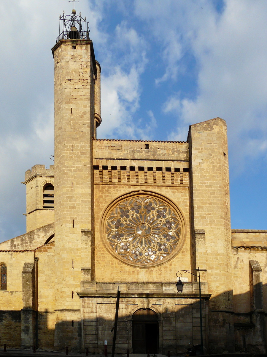 Collégiale de Saint-Paul, Clermont-l'Hérault, France